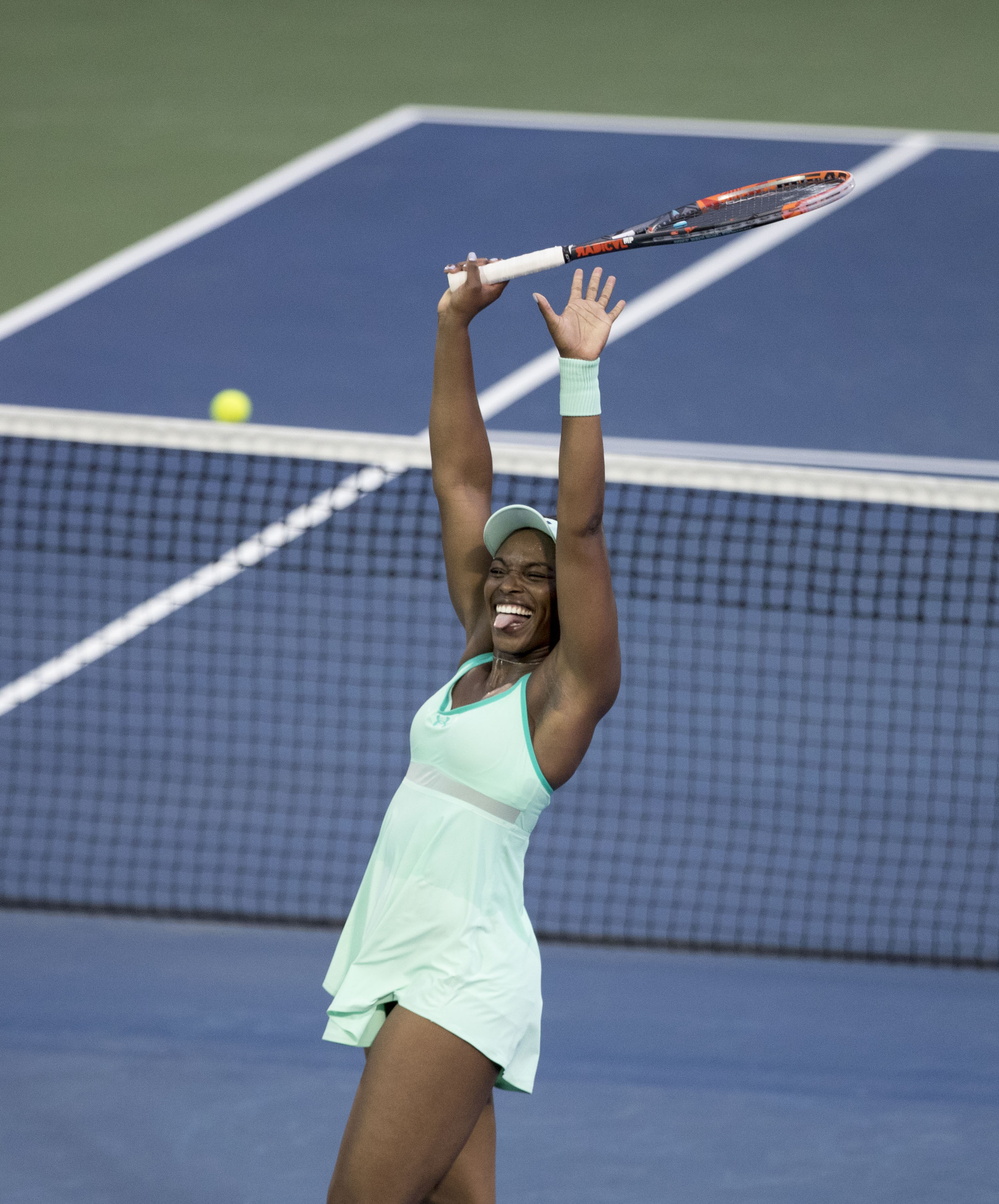 Citi Open Tennis 2017